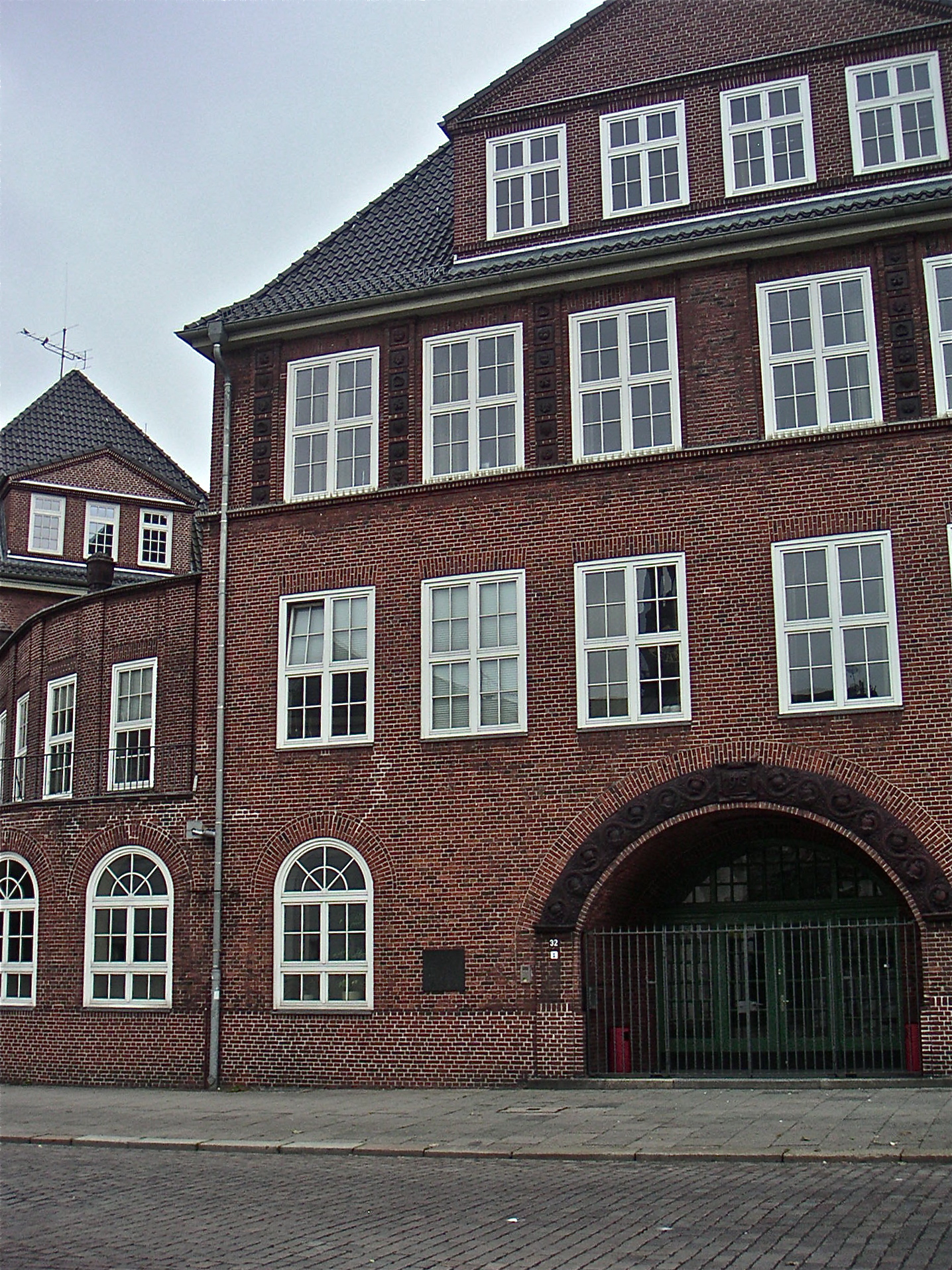 Zeughausmarkt 32, Anna-Siemsen-SchuleThis is a photograph of an architectural monument.